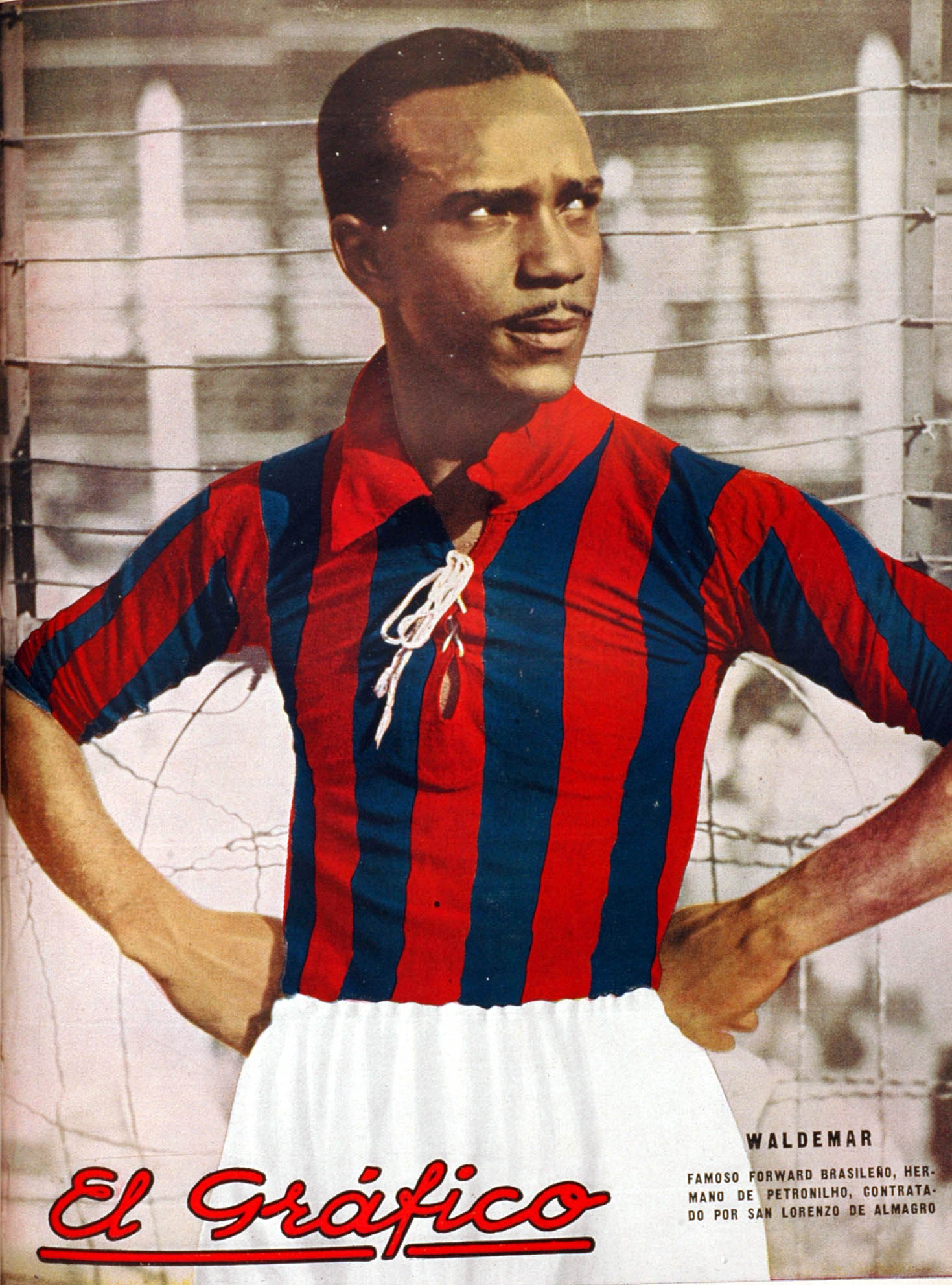 El Grafico del 16 de Marzo de 1935. Edicion 818